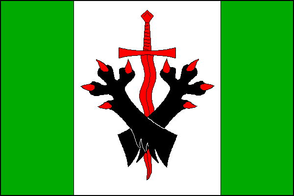 vlajka, Rejchartice, okres Šumperk